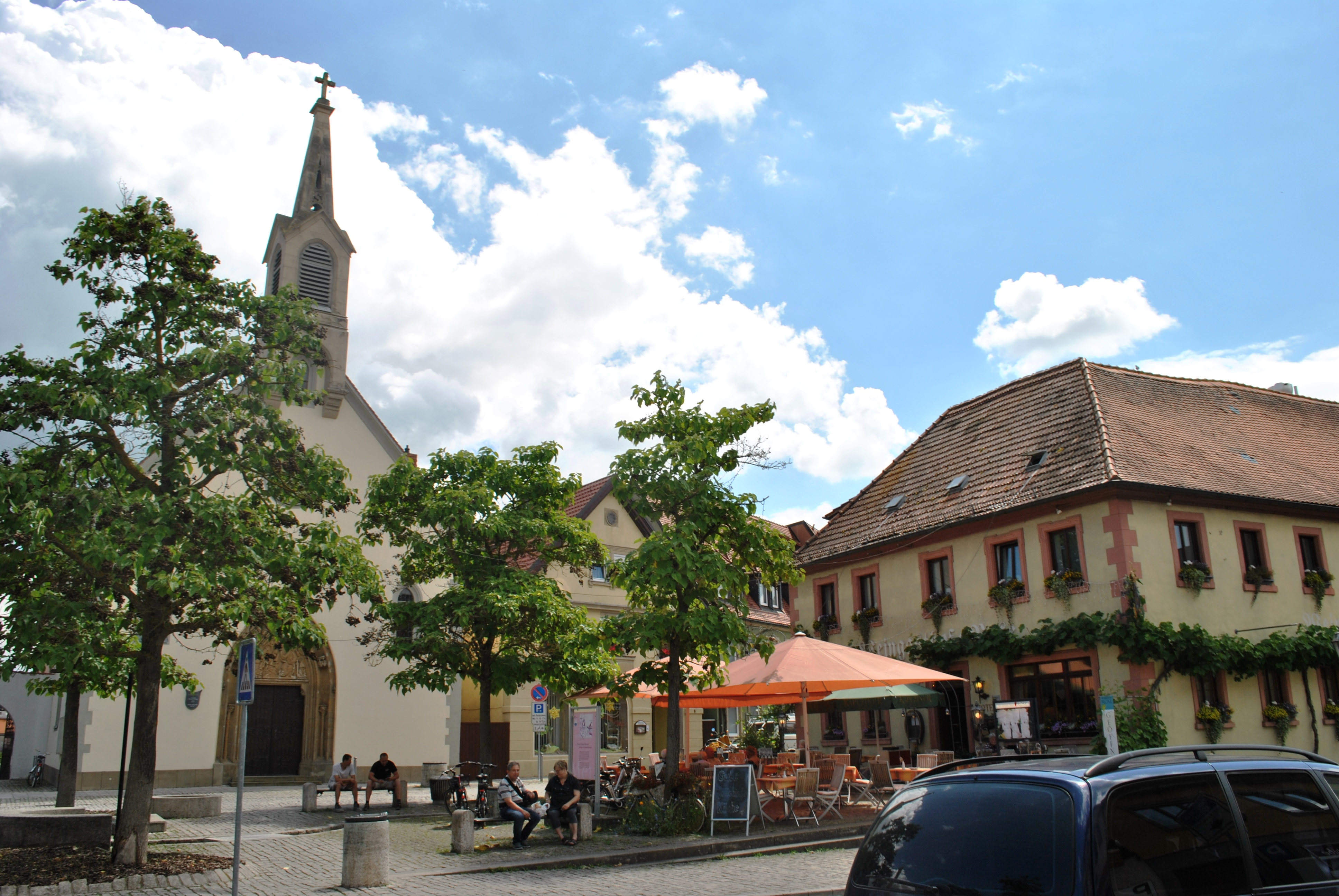 Oberer Markt mit St. Michael, Gasthaus zur Rose, Geburtshaus von Peter und Sebastian Geist